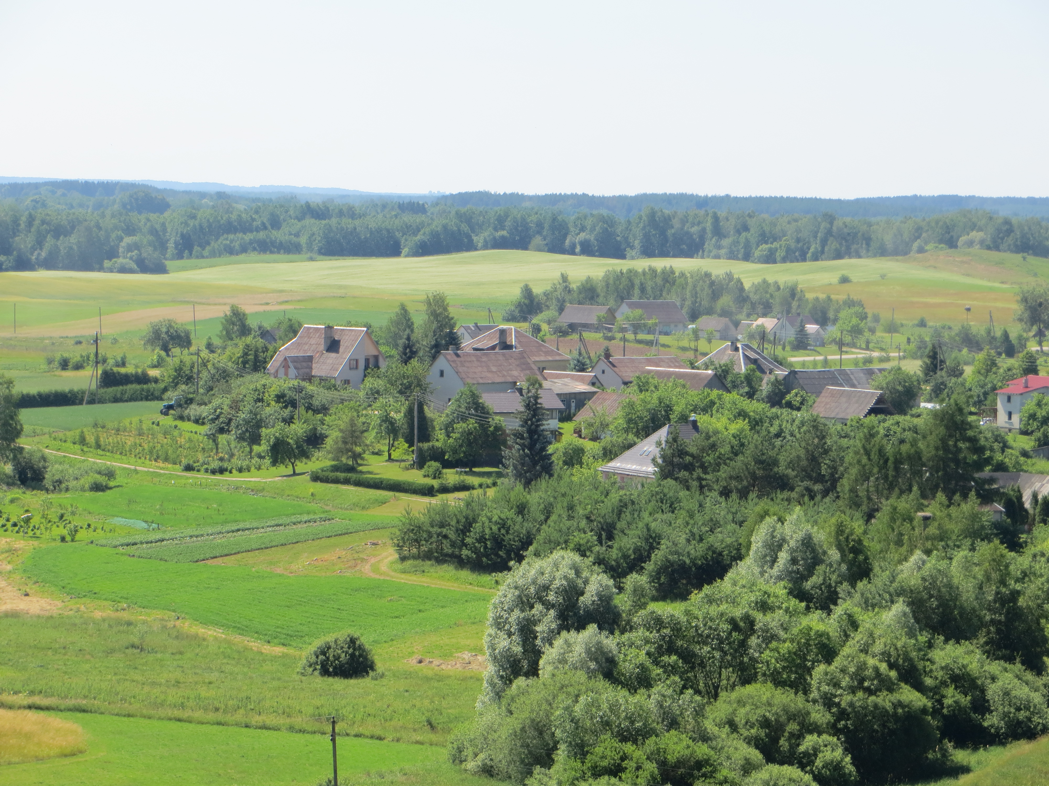 Daugai, Lithuania